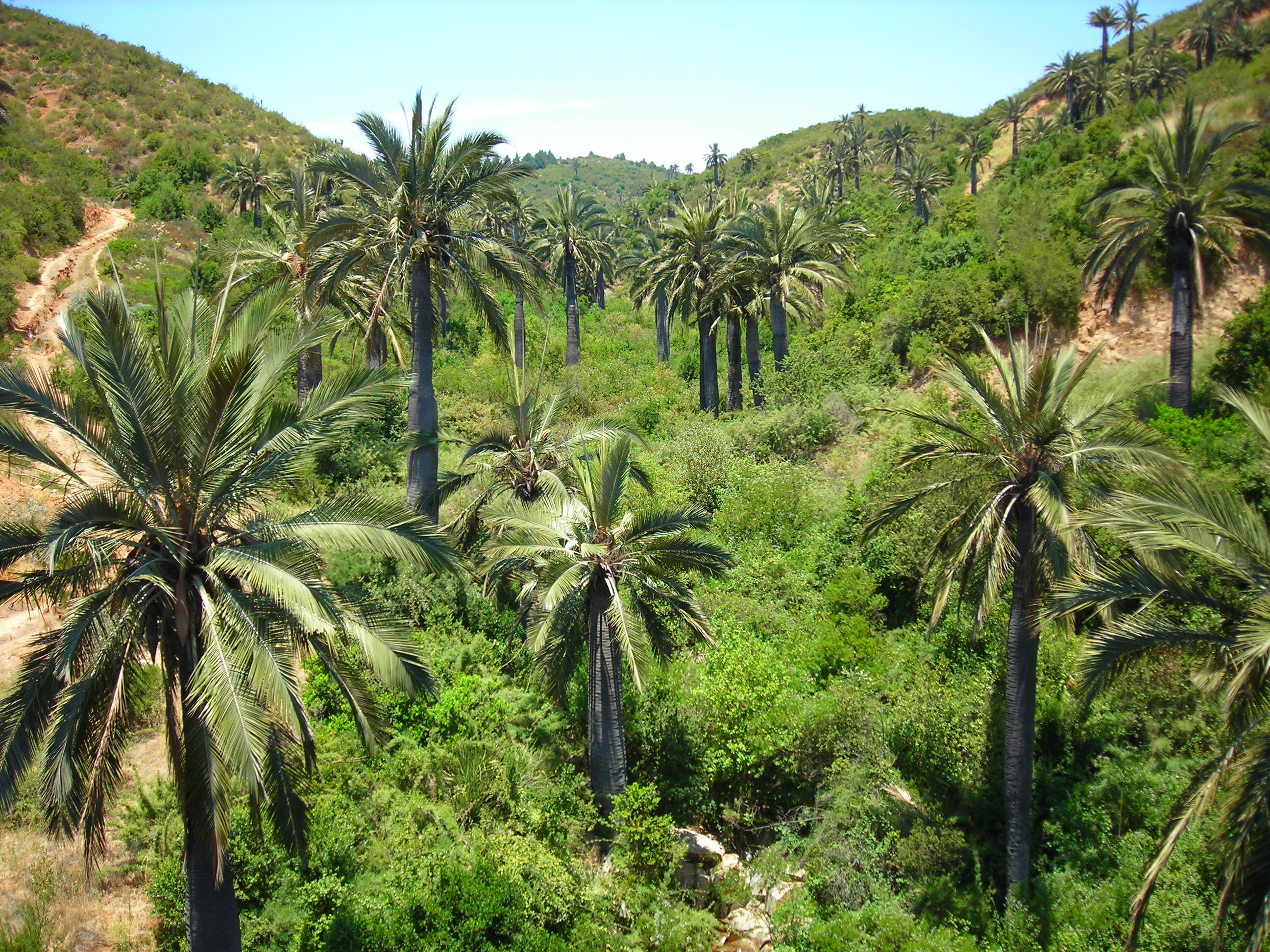 Jubaea chilensis, Santuario de la Naturaleza Palmar El Salto. Quebrada El Quiteño.